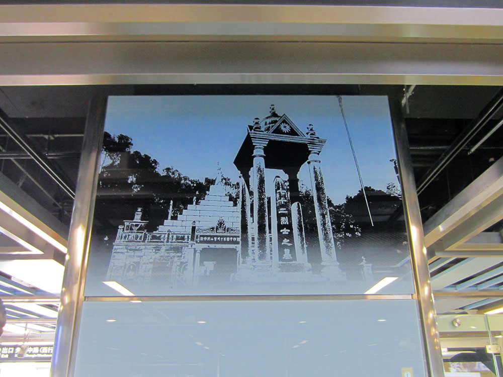 黃花崗站柱上裝飾畫